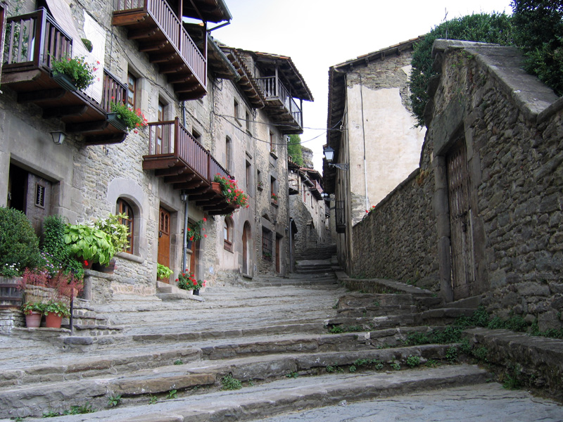 Carrer del nucli antic de Rupit One street at Rupit, Catalonia